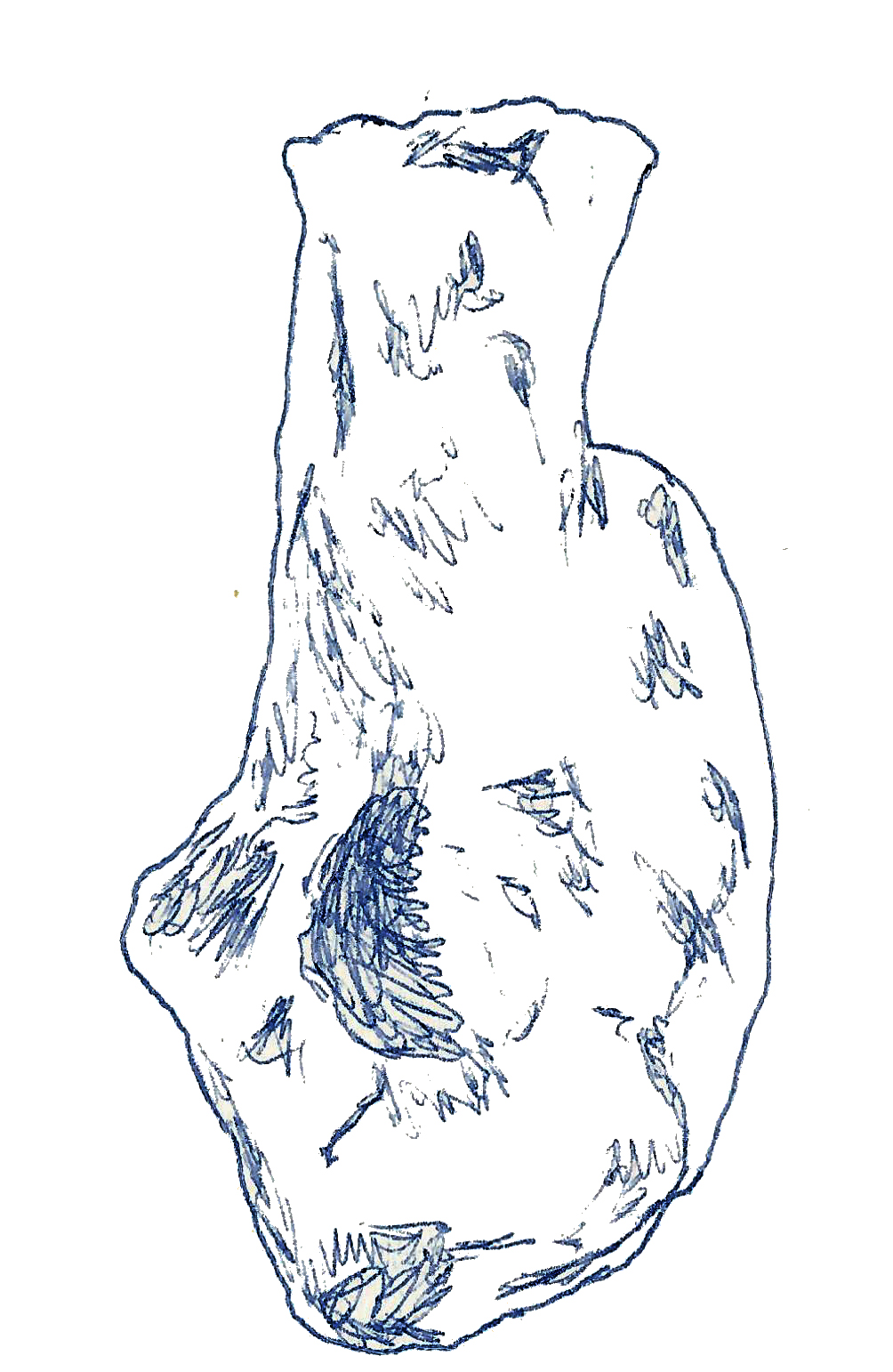 Illustration of a fossil of Chubutisaurus